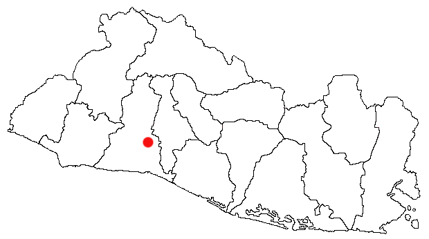 Ubicación de la ciudad de Santa Tecla en el mapa de El Salvador